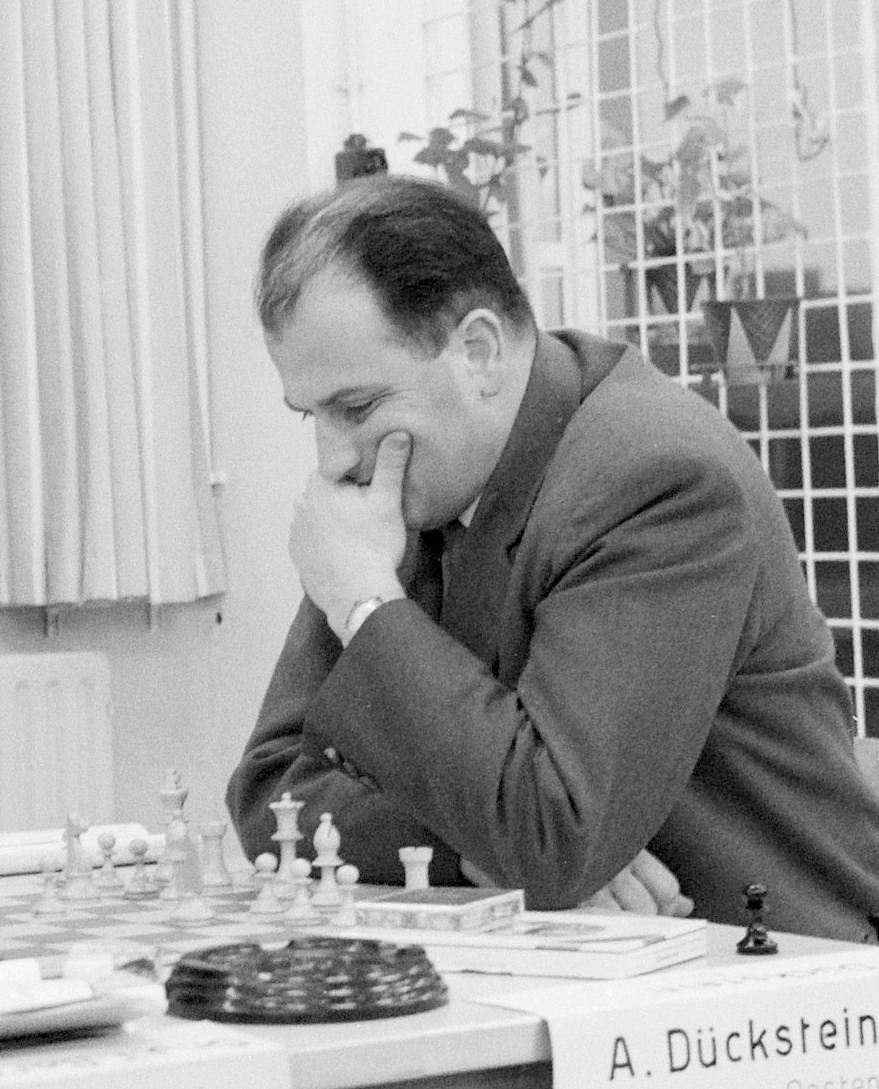 Zone-schaaktoernooi te Berg en Dal, Barendregt tegen Duckstein